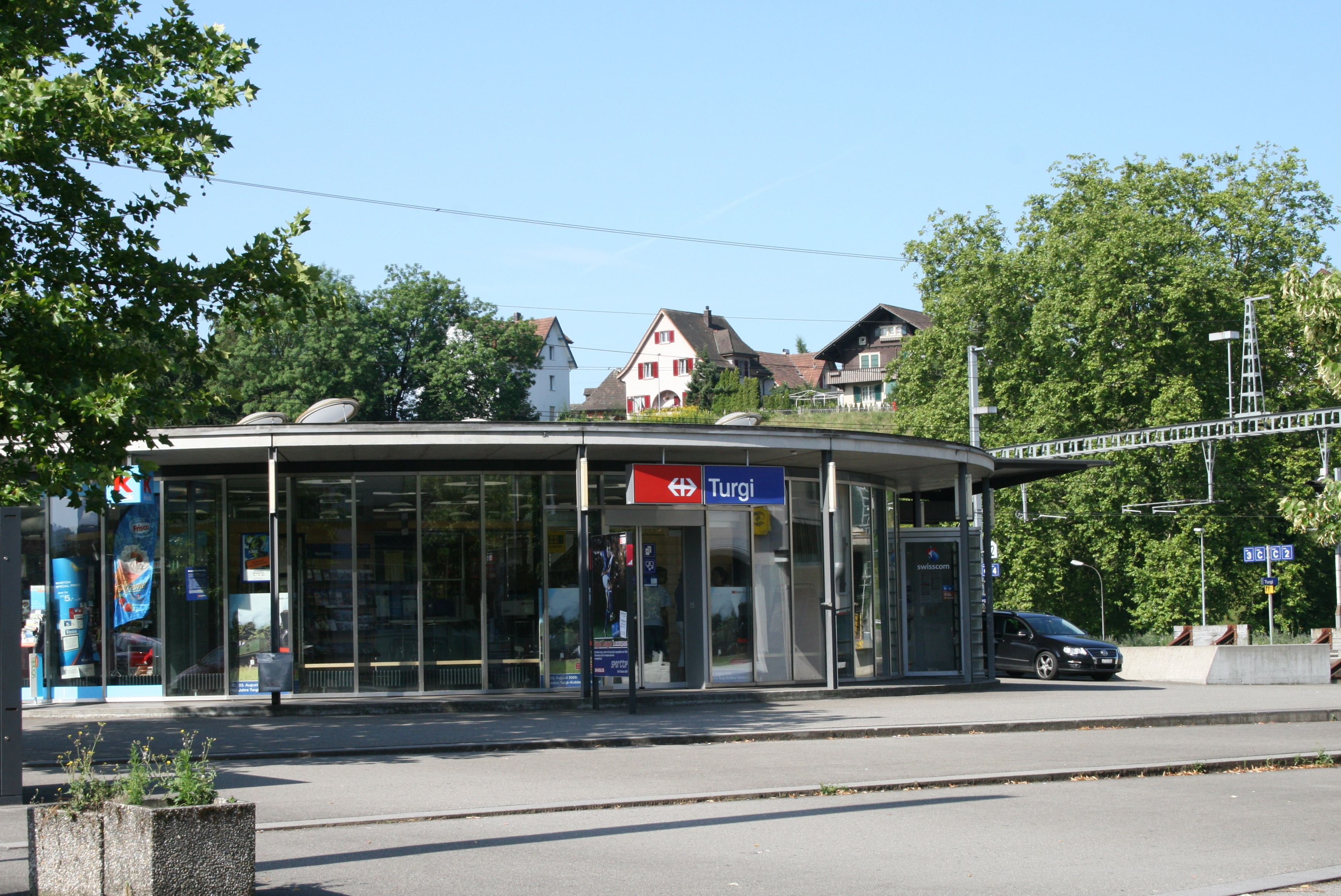 Bahnhof Turgi, Schweiz